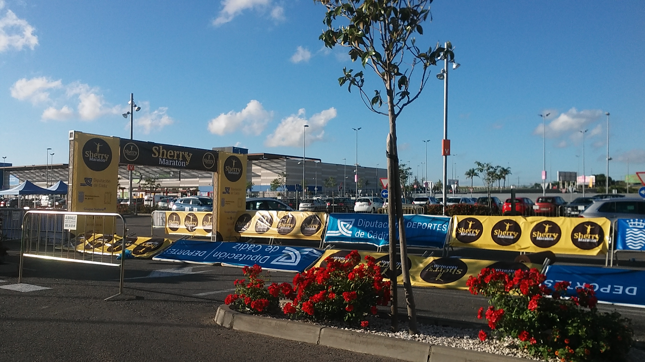 Meta del I Sherry Maratón en Luz Shopping. Jerez, Andalucía (España)